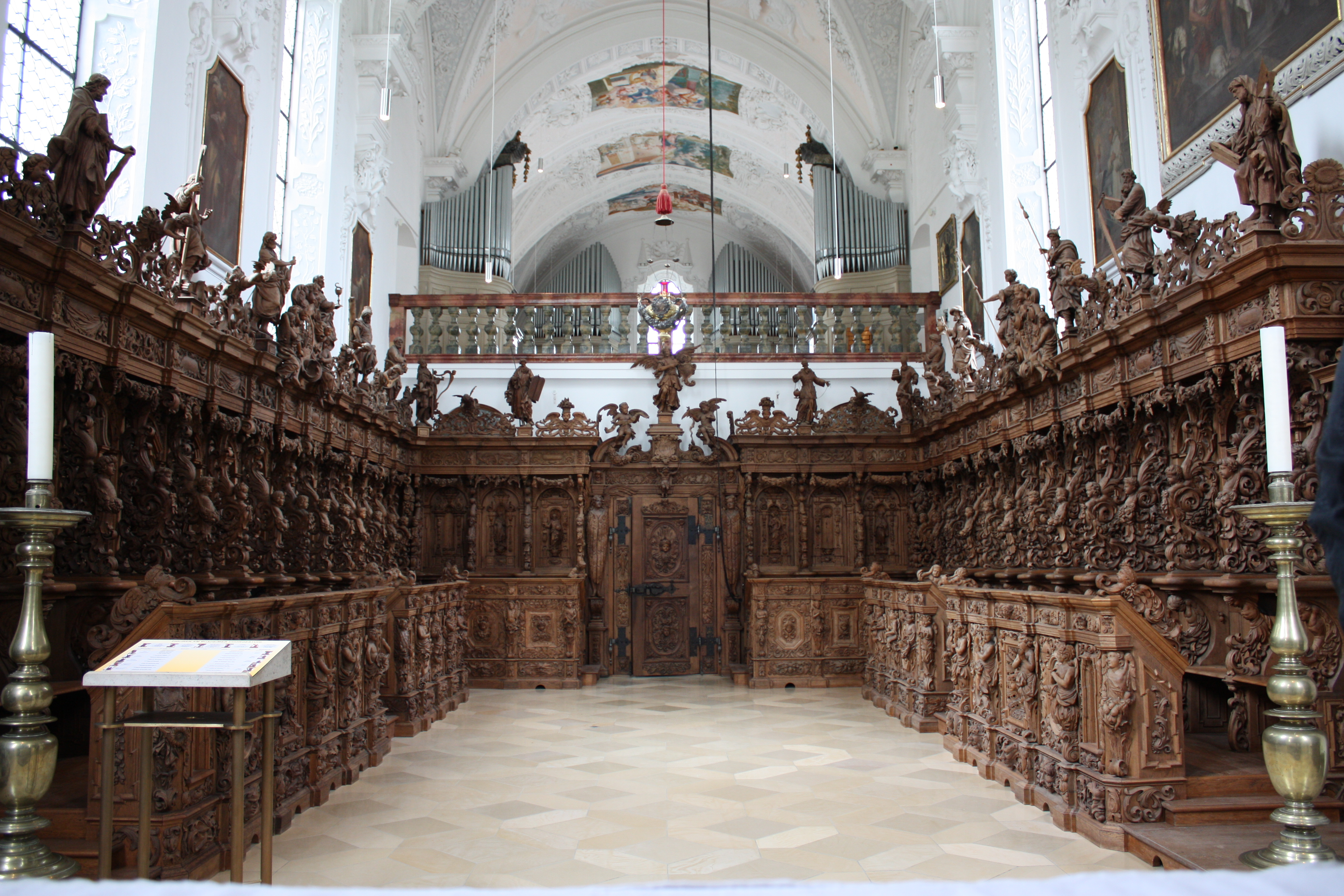 Chorgestühl in der ehemaligen Klosterkirche der Kartause in Buxheim bei Memmingen